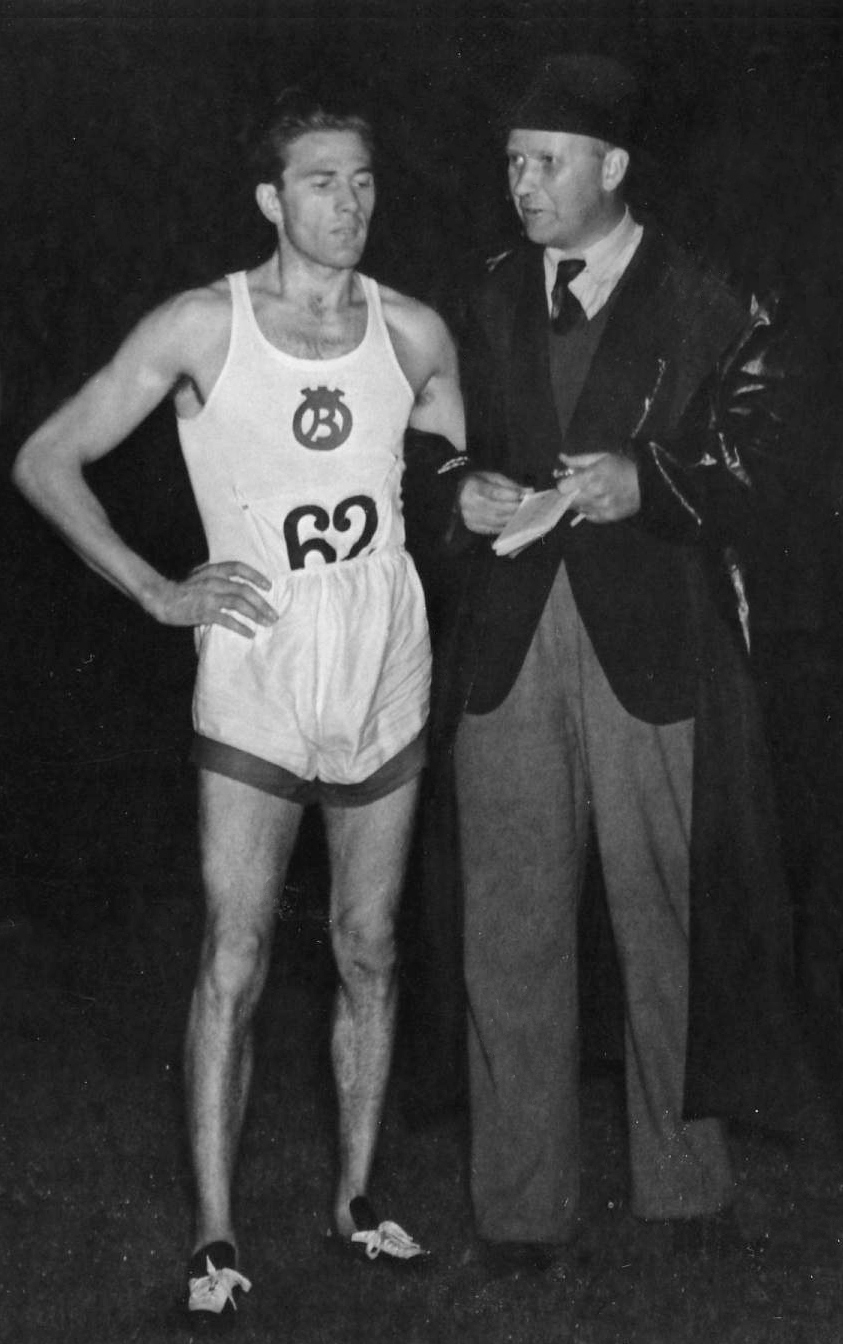 Left-right: Henry Kälarne and Gösta Holmér